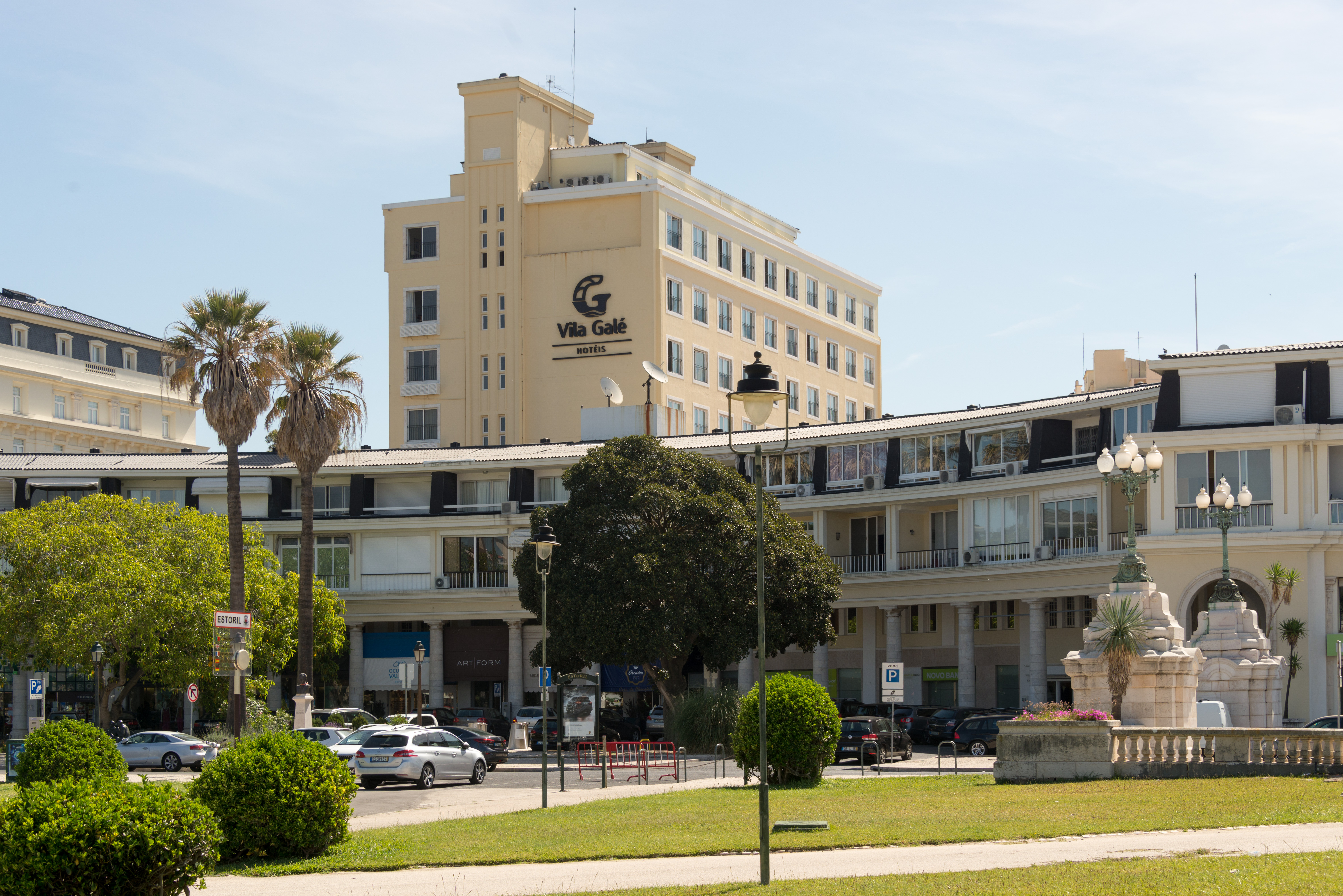 33065-Lisbon